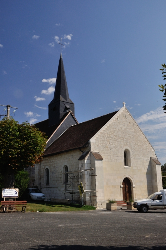 Eglise Saint-Sulpice - Jeu-Maloches (Indre)